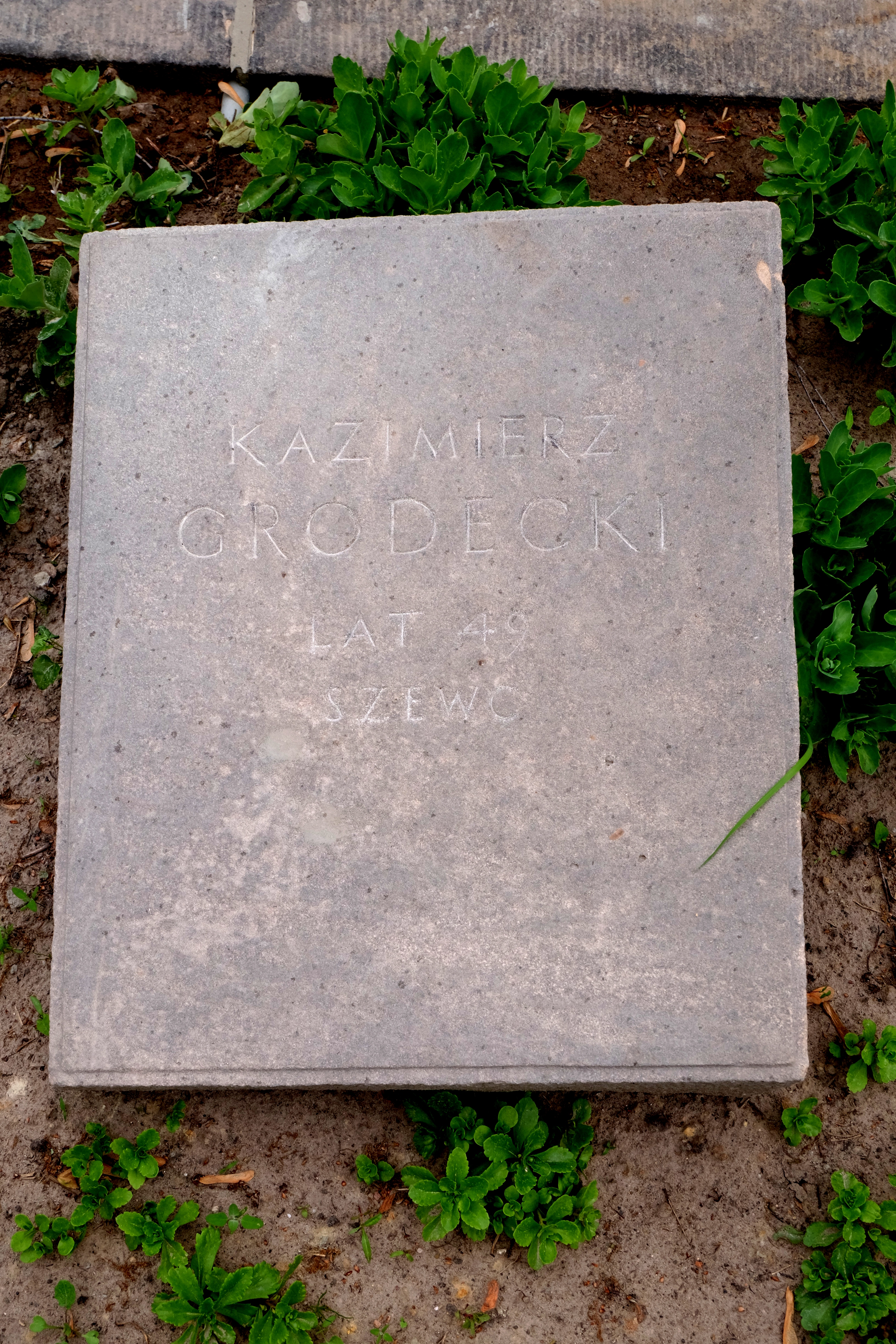 Grób działacza komunistycznego Kazimierza Grodeckiego na Cmentarzu Wojskowym na Powązkach w Warszawie